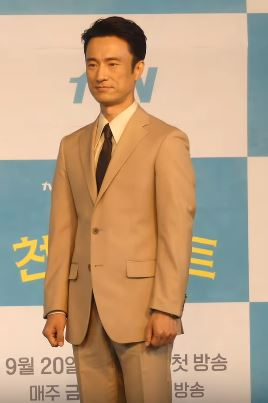 16일 오전 서울시 마포구 도화동 베스트웨스턴프리미어 서울가든호텔에서 tvN 새 금요드라마 '쌉니다 천리마마트' 제작발표회가 열려 배우 가 참석해 포토타임을 갖고 있다.